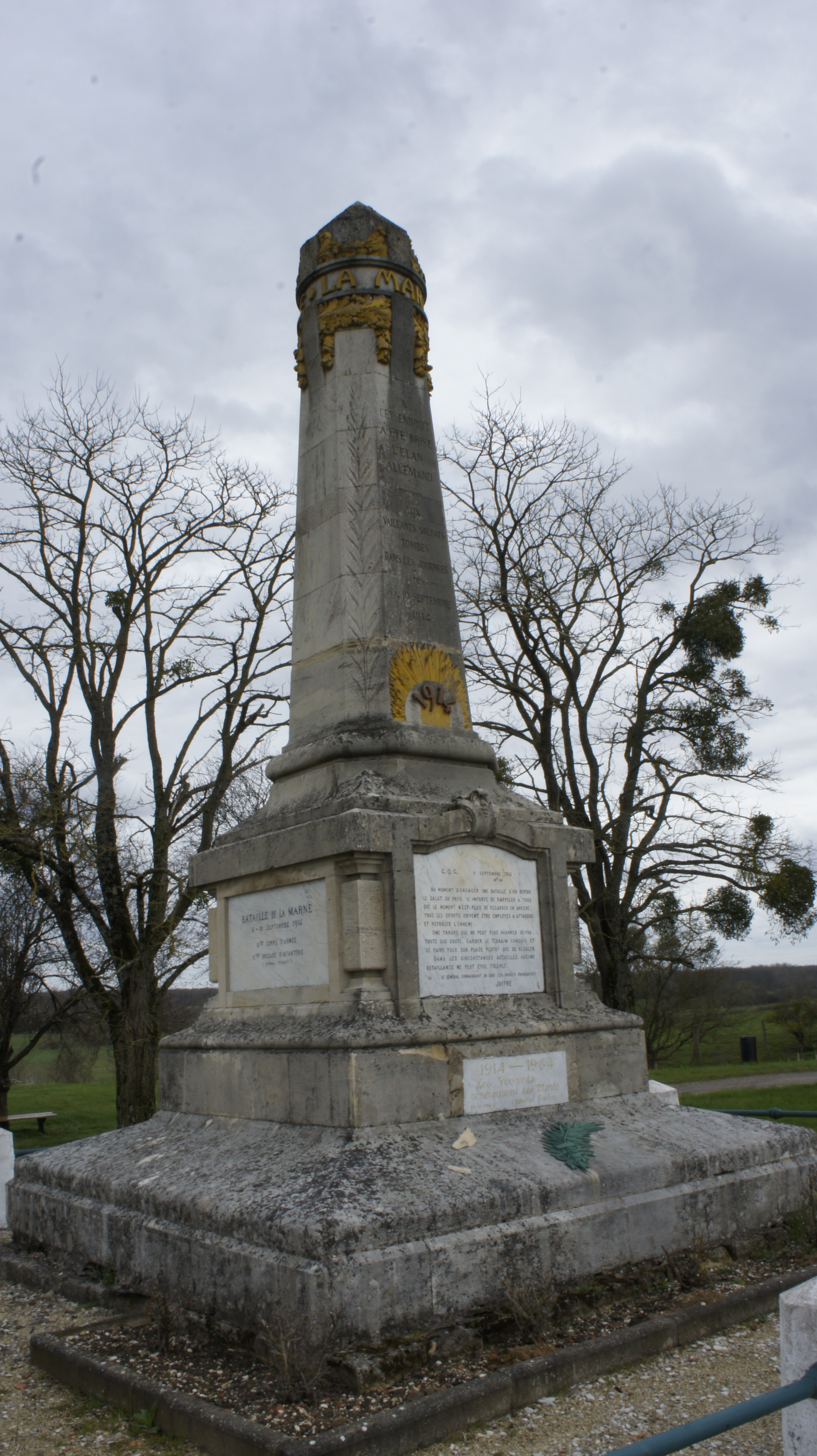 Monument érigé en mémoire de la Première bataille de la Marne par le général TOulorge .